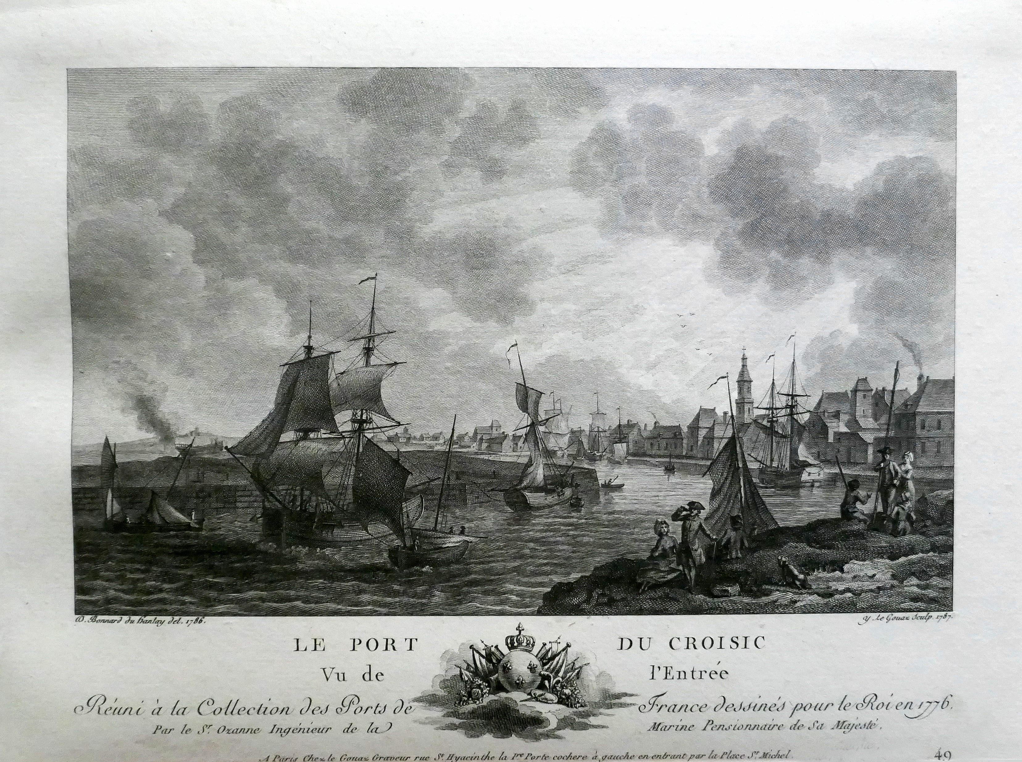 Le port du Croisic vu à l'entrée, "réuni à la collection des ports de France dessinés pour le Roi en 1776 par le Sr Ozanne, ingénieur de la Marine, pensionnaire de sa Majesté" Gravure sur cuivre. Musée des marais salants à Batz-sur-Mer (Loire-Atlantique).